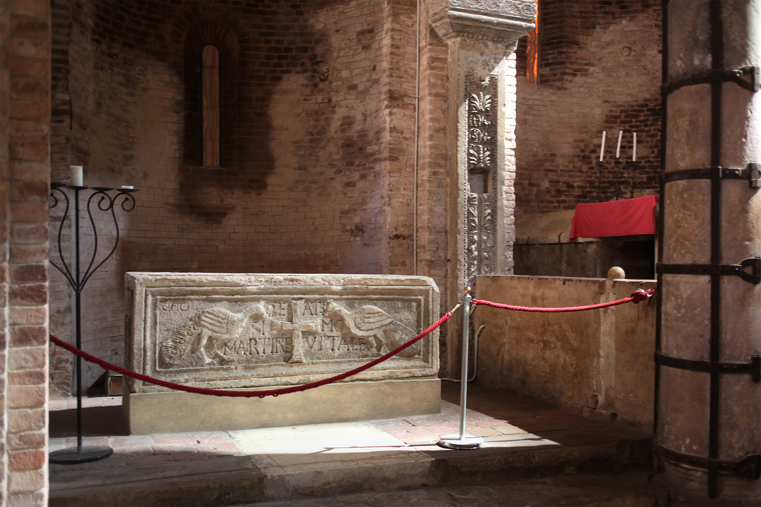 Il sarcofago di San Vitale nella Basilica dei protomartiri San Vitale e Sant'Agricola, Bologna